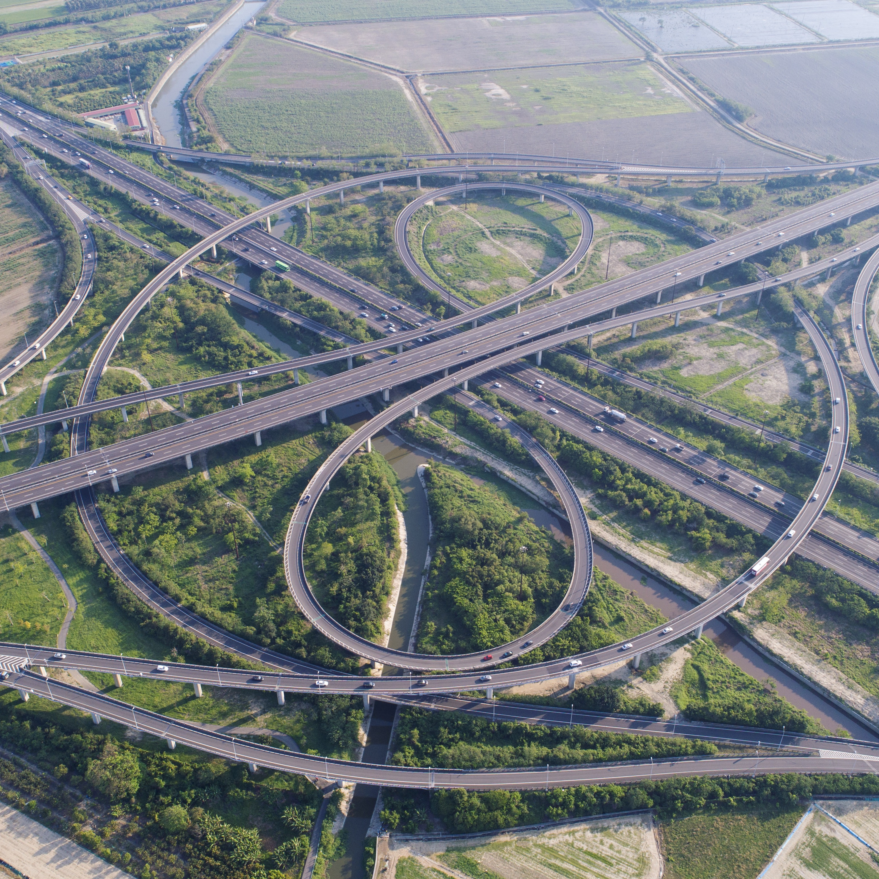 臺南系統交流道